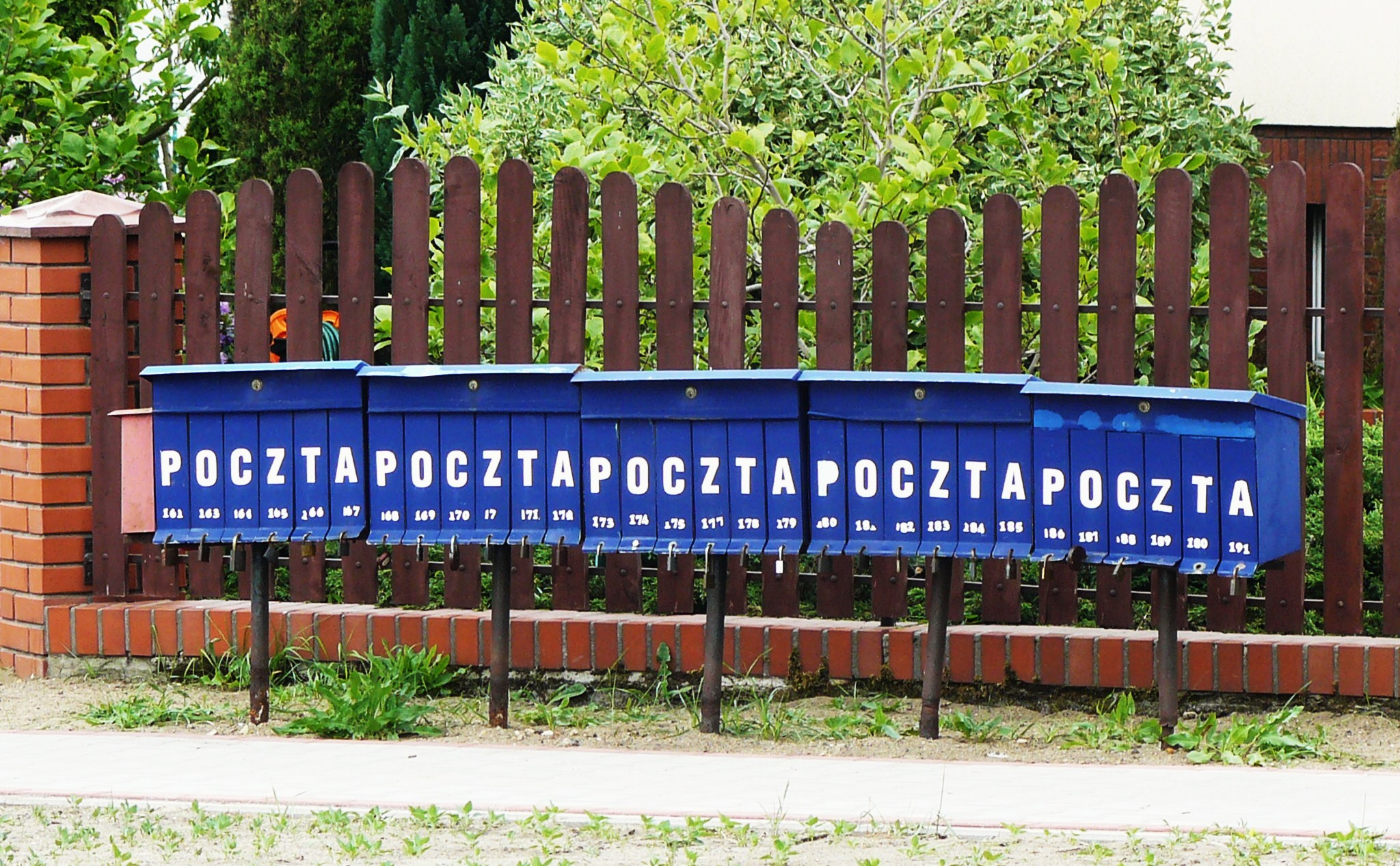 Skrzynki pocztowe w Drawskim Młynie.